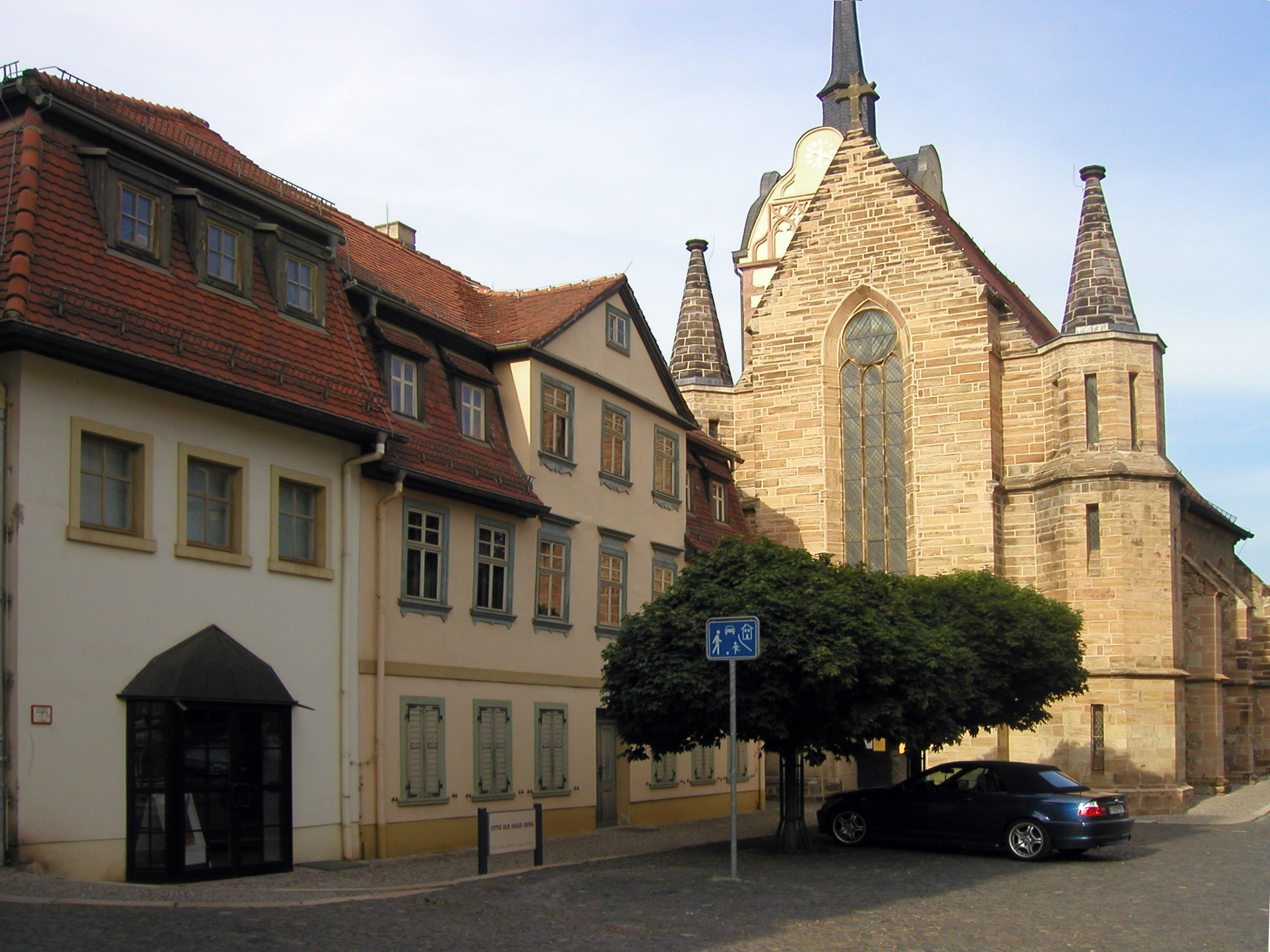 Bildbeschreibung: Otto-Dix-Haus in Gera Quelle: eigenes Bild Fotograf/Zeichner: Schorle Datum: 24.6.2006 Sonstiges: ...